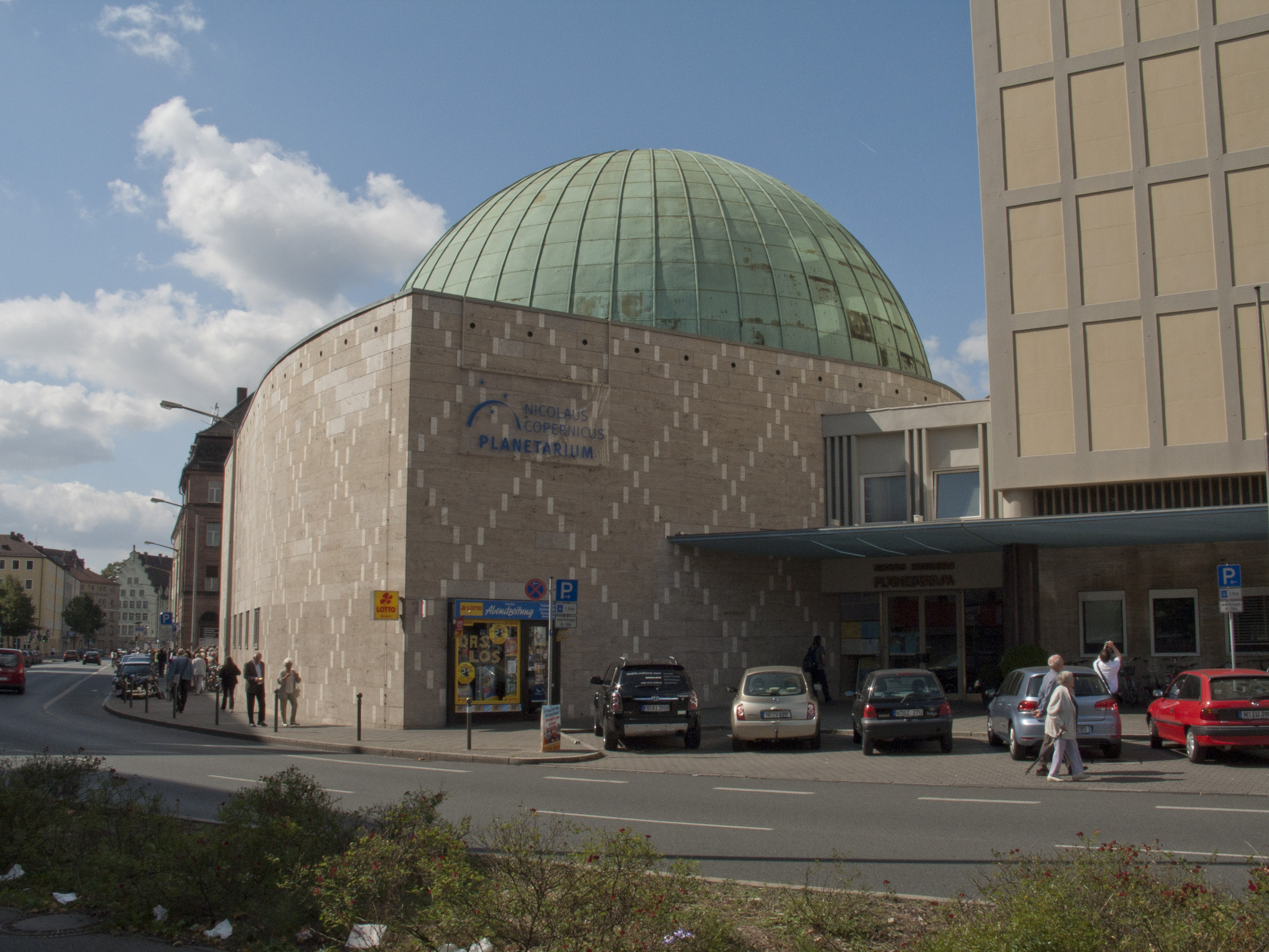 Nürnberg-Gostenhof, Nicolaus-Copernicus-Planetarium (Am Plärrer 41/Rothenburger Str. 2).